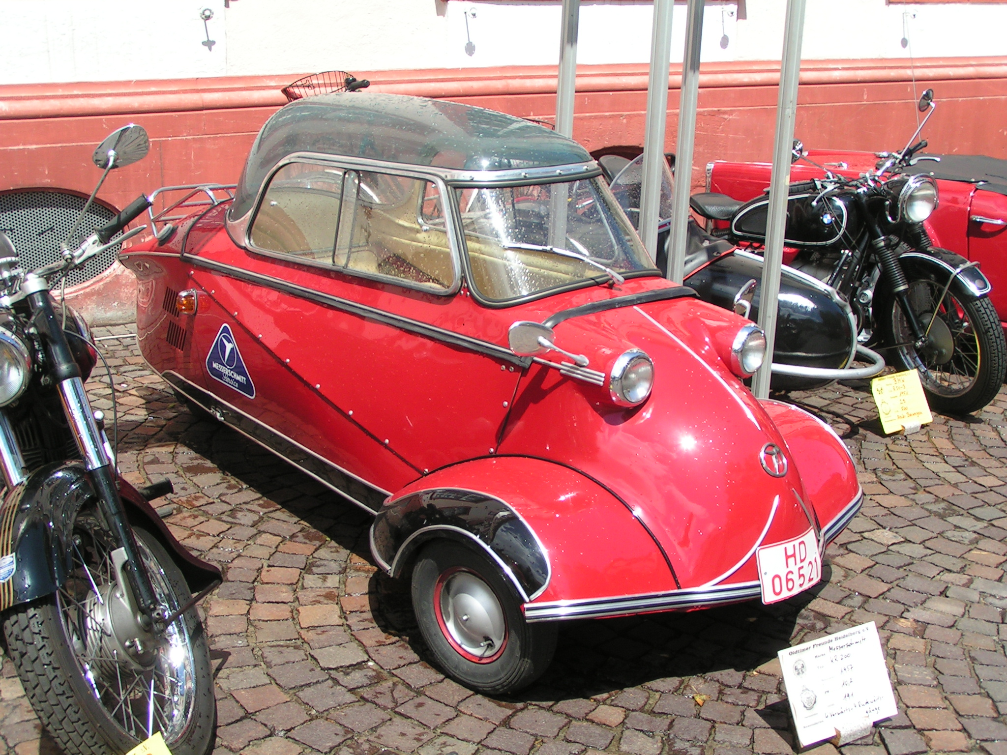 Messerschmitt Kabinenroller in Heidelberg